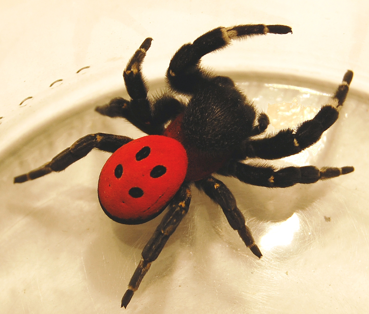 Eresus cinnaberinus spec